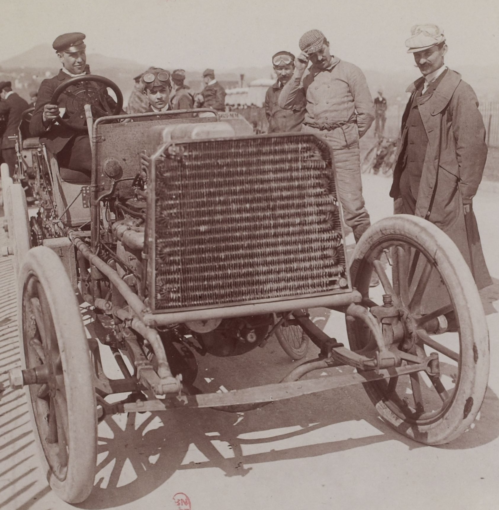 [Collection Jules Beau. Photographie sportive] : T. 25. AnnÃ©e 1904 / Jules Beau : F. 23v. [Mille, Coupes de Rothschild, Nice, 31 mars 1904]